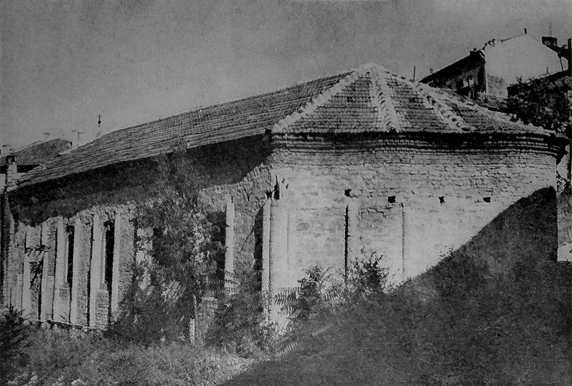 Снимка на църквата "Св.Спас", поместена в книгата "Майстор Никола Фичев (Уста Колю Фичето) 1800-1881"